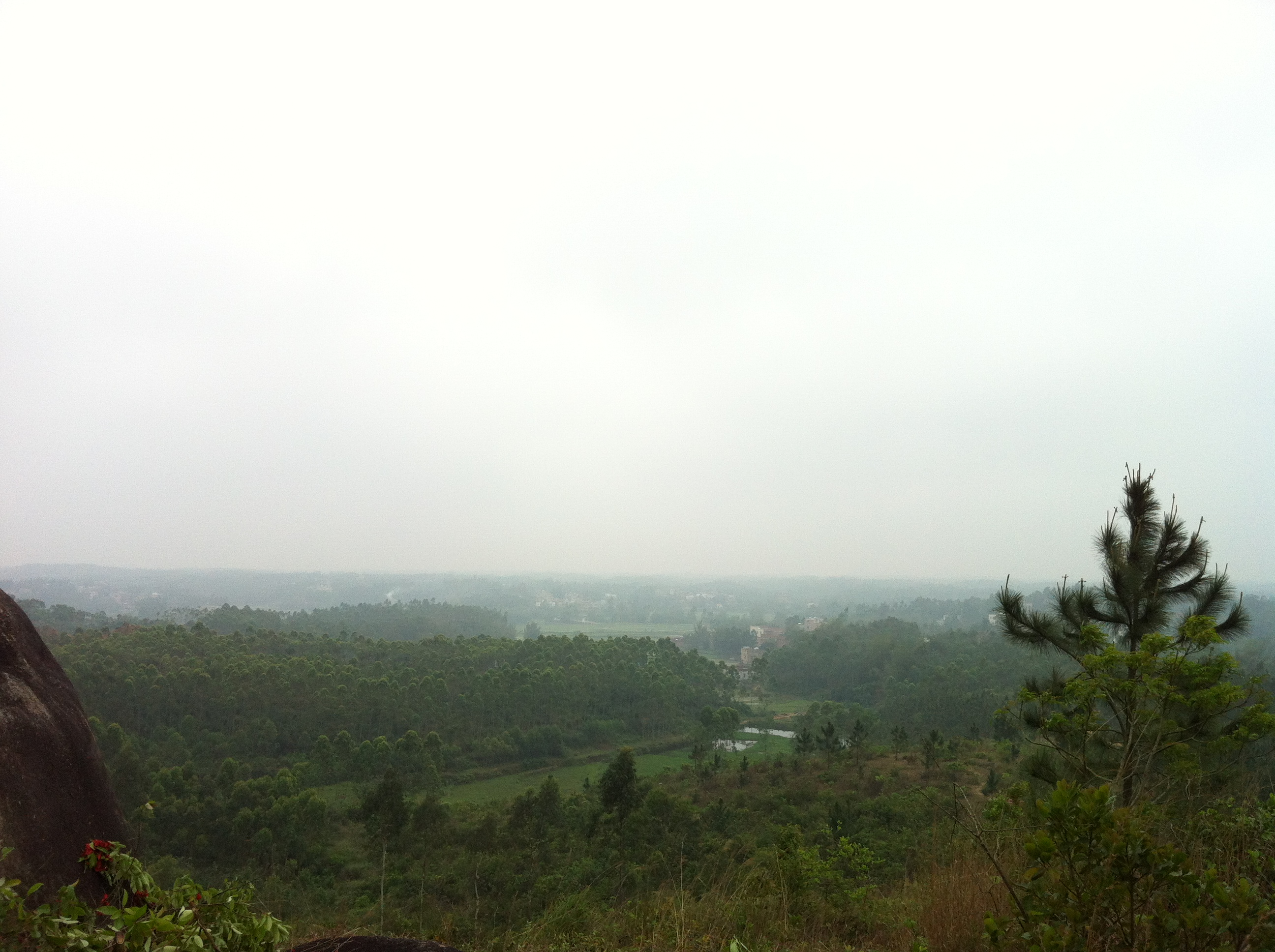 Lianjiang, Zhanjiang, Guangdong, China